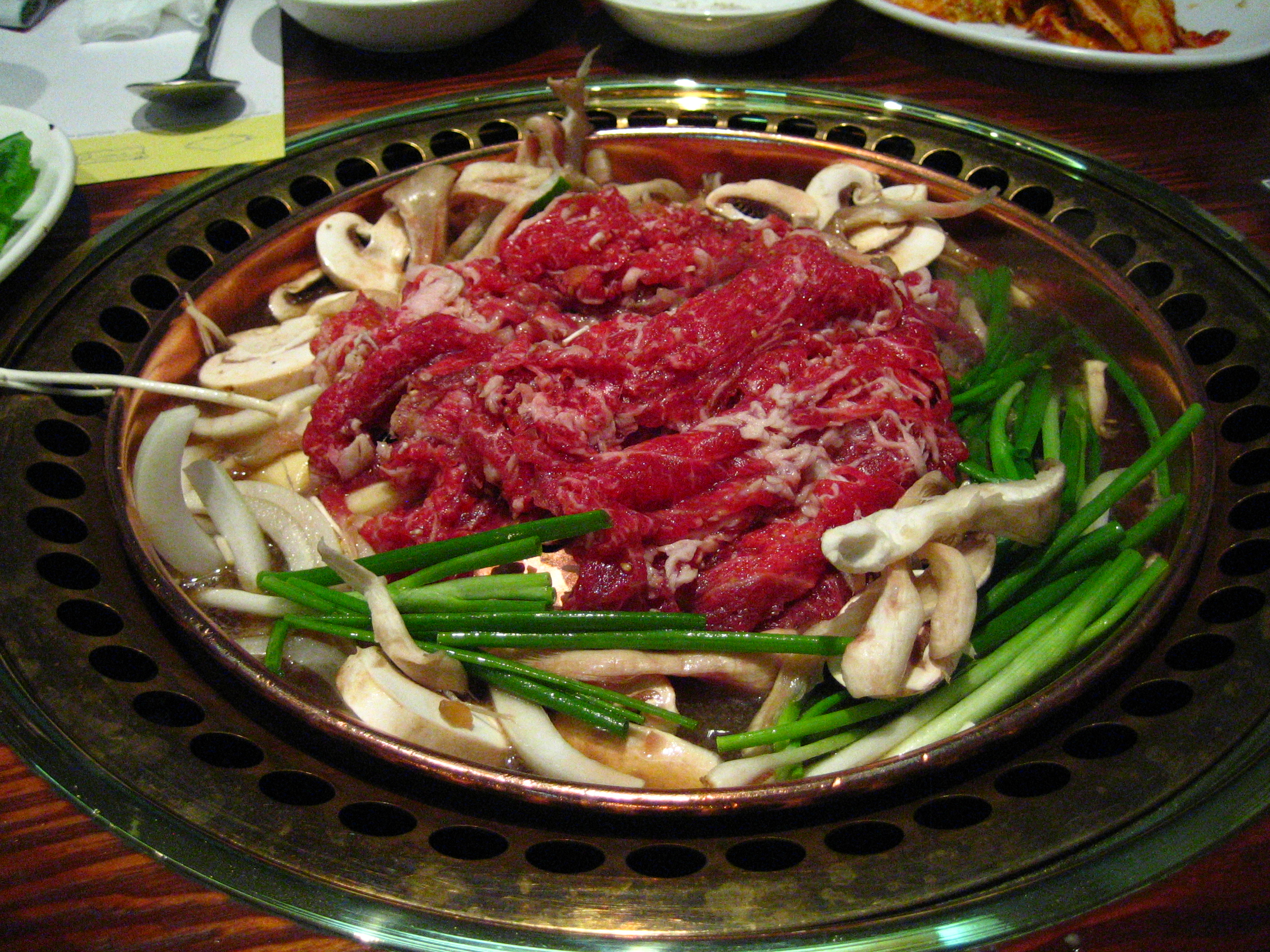 Bulgogi, a Korean dish